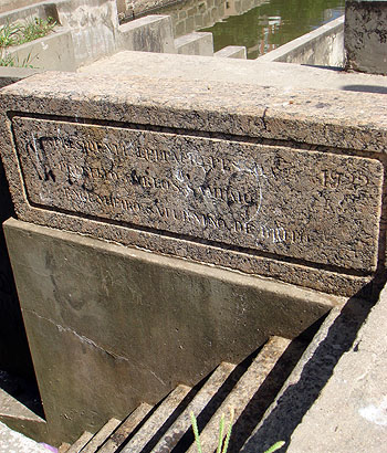 Placa do Jardim de Alah